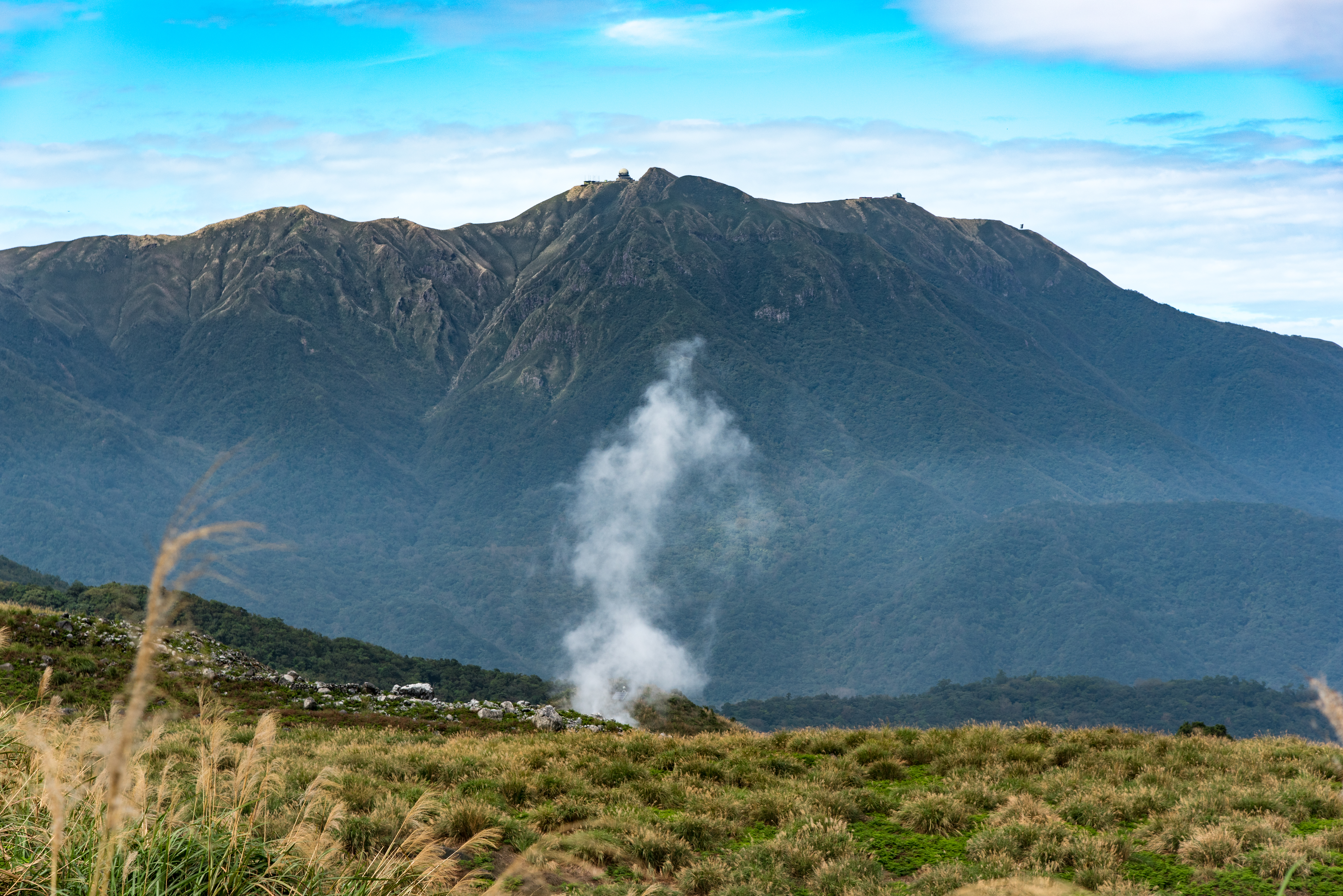 攝於陽明山國家公園